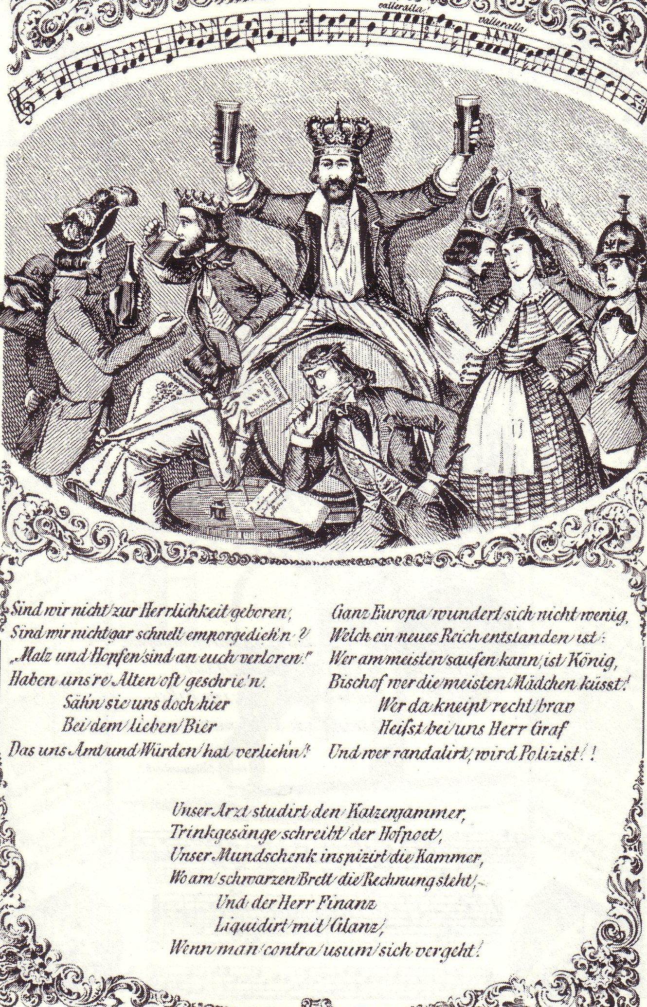 Text, Melodie und Illustration des Liedes "Sind wir nicht zur Herrlichkeit geboren"